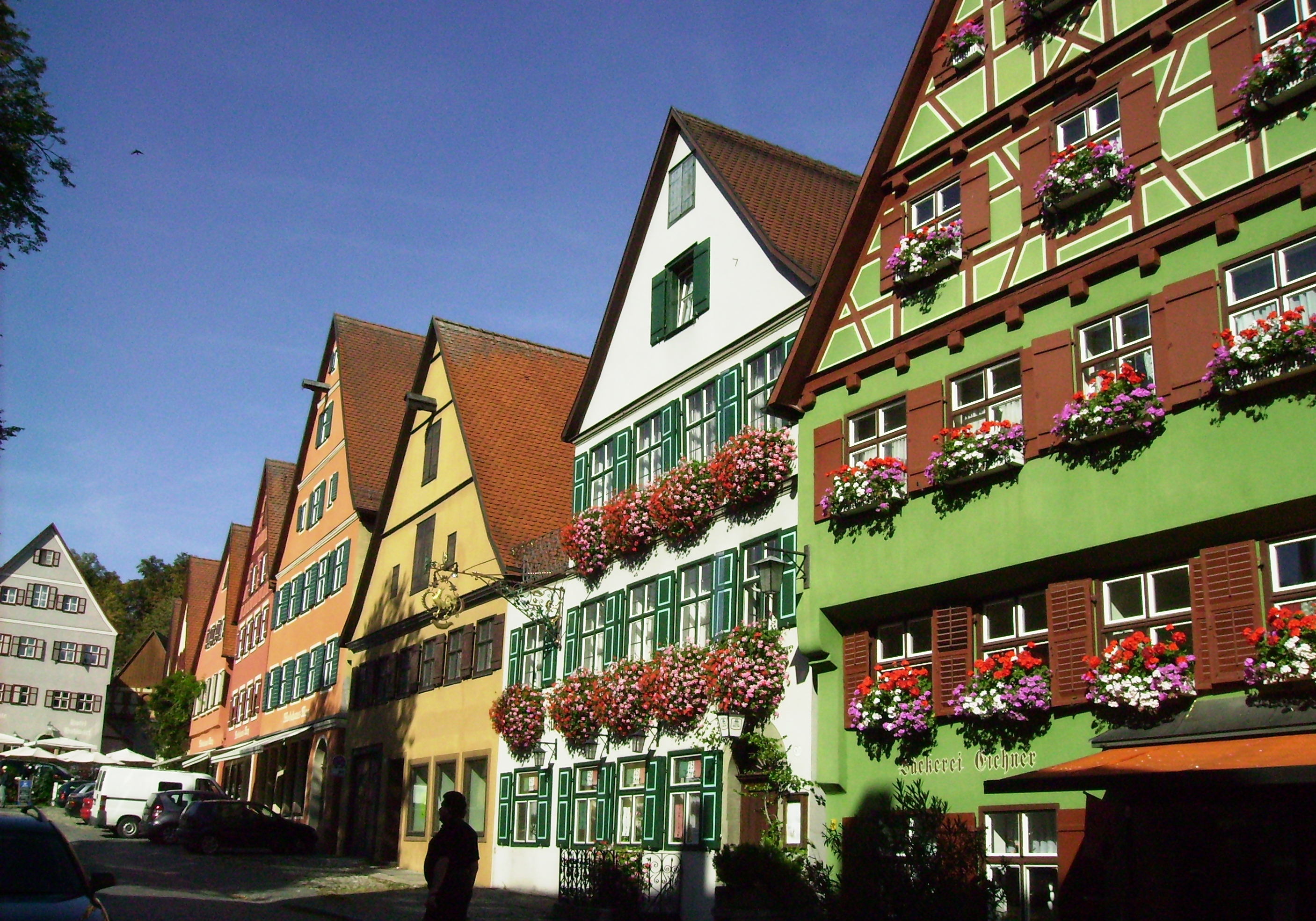 Segringer Strasse Dinkelsbuehl